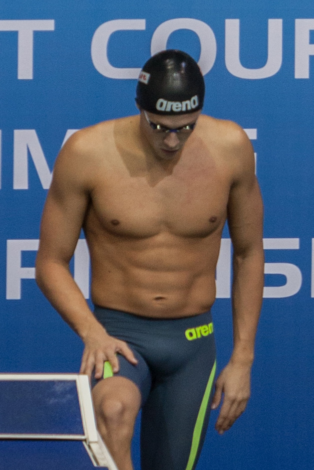 השחיין יאוגן צורקין באליפות אירופה בבריכות קצרות בנתניה, 2015